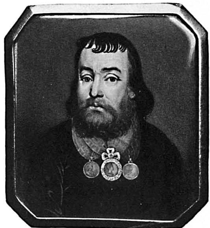 Василий Алеексеевич Злобин (1761-1814)